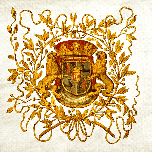 Зворотній бік прапора роти гренадерського полку Фрідріха-Казимира Кеттлера з гербом герцогства Курляндії і Семигалії. Реконструкція. Зберігається у Колекції державних трофеїв, Армійський музей, Стокгольм, Швеція.